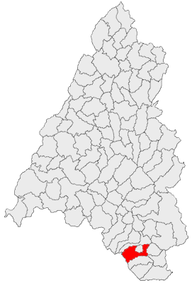 Categorie:Hărţi ale judeţului Bihor